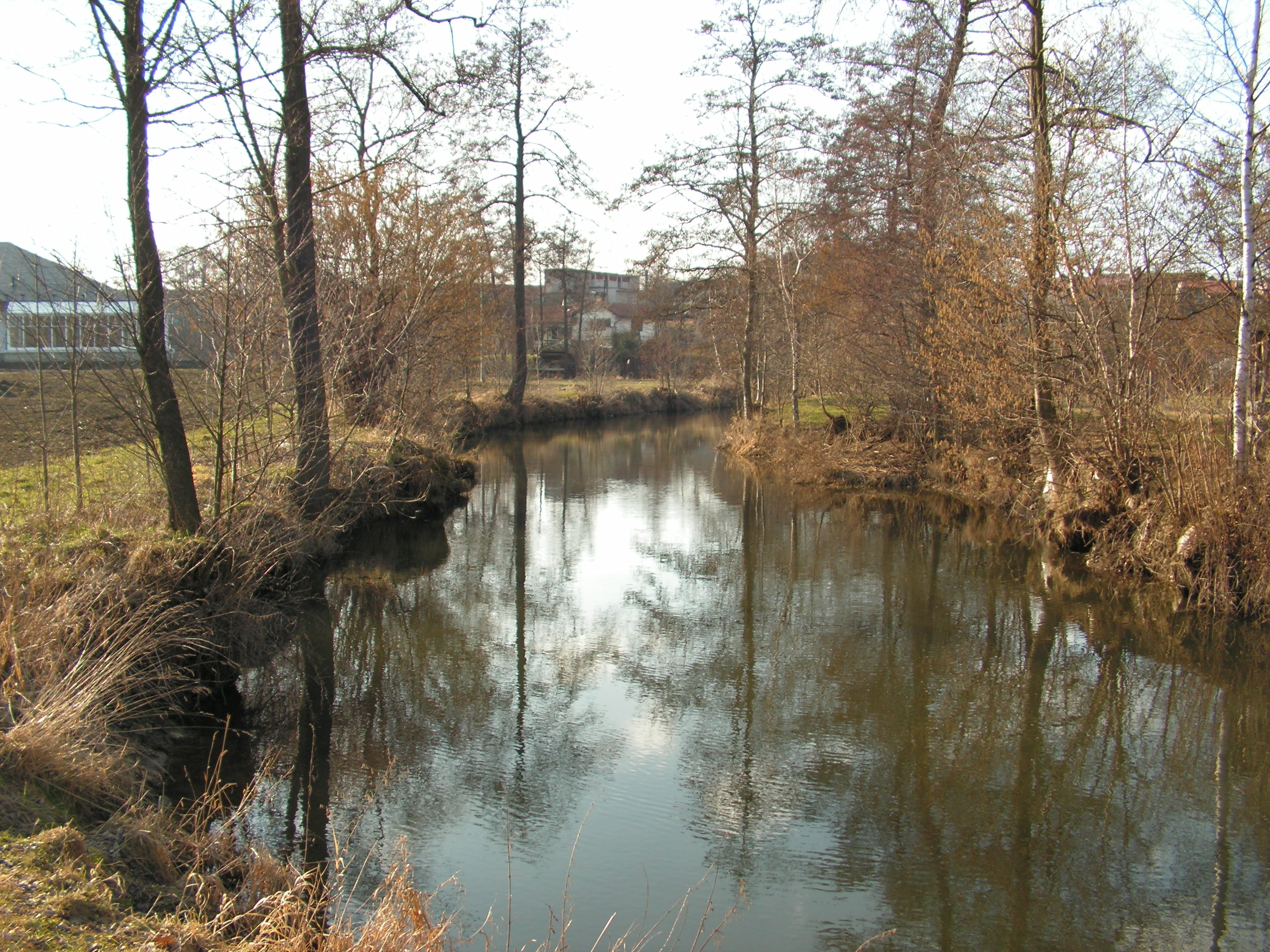 Říčka Šlapanka nedaleko ústí do Sázavy v Havlíčkově Brodě